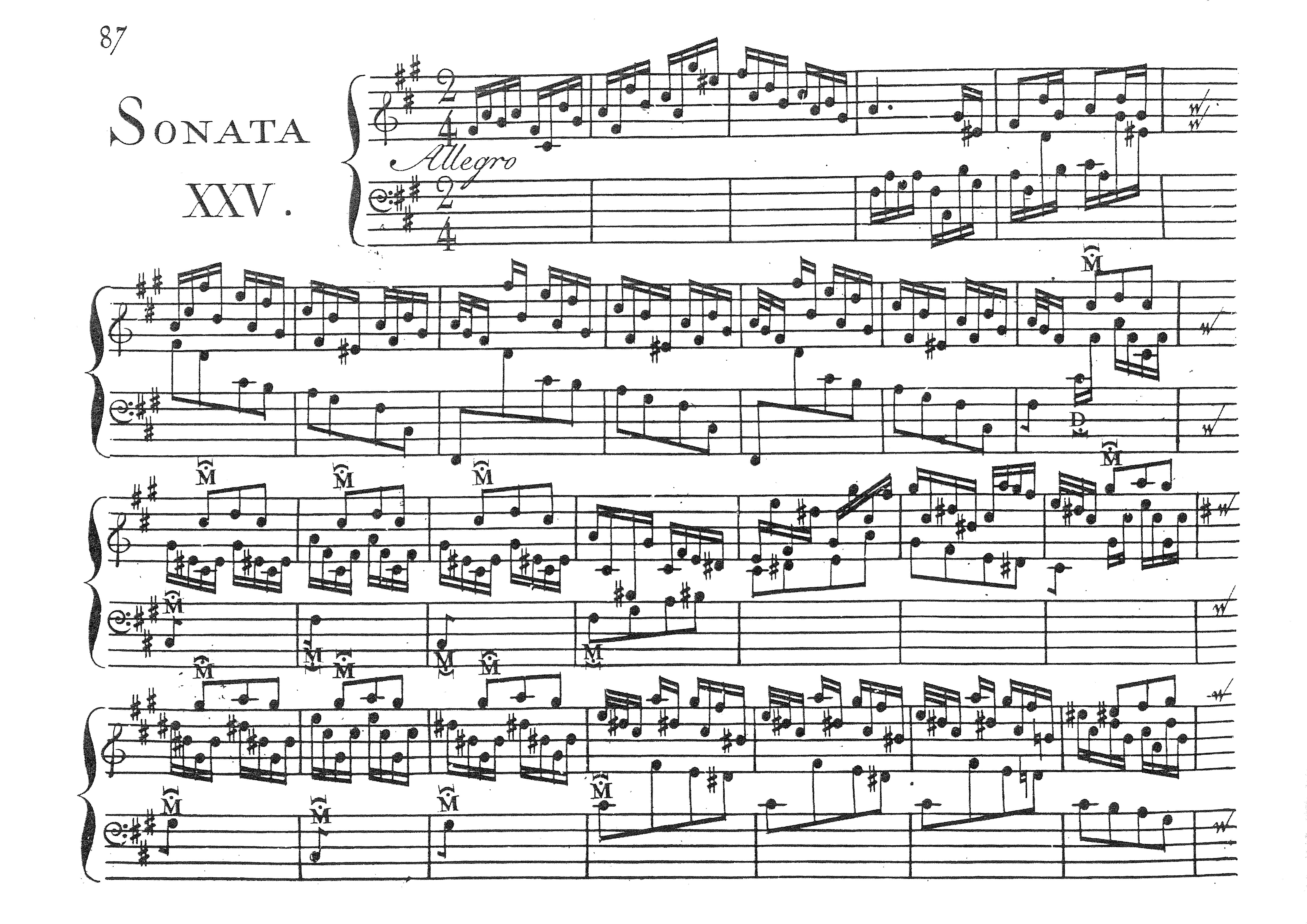 La sonate K. 25, telle qu'elle se présente dans l'édition des Essercizi per gravicembalo, publiée à Londres en 1738.